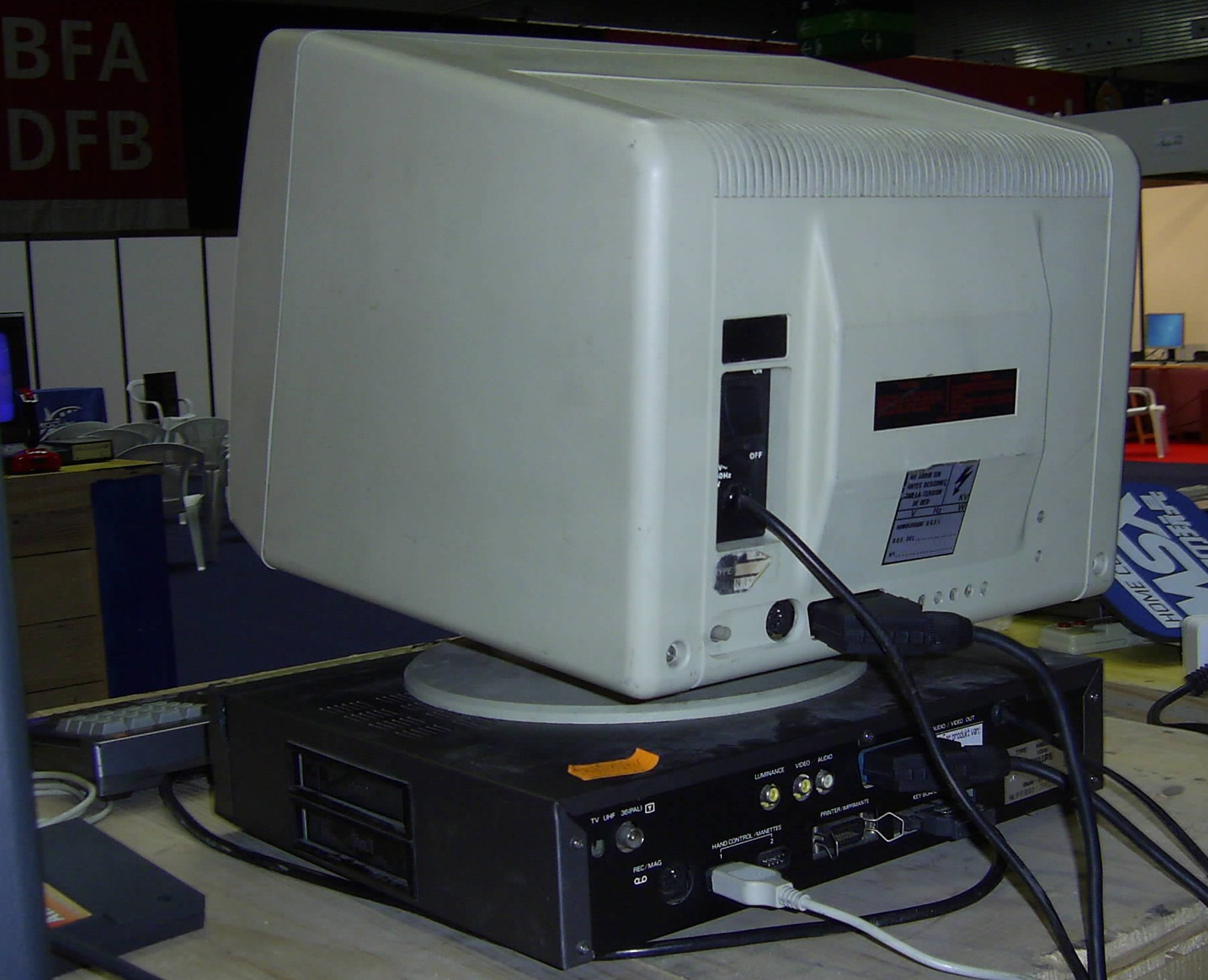 vista frontal de un ordenador doméstico Philips NMS 8250 MSX-2 en el juegódromo de la RetroEuskal 2007